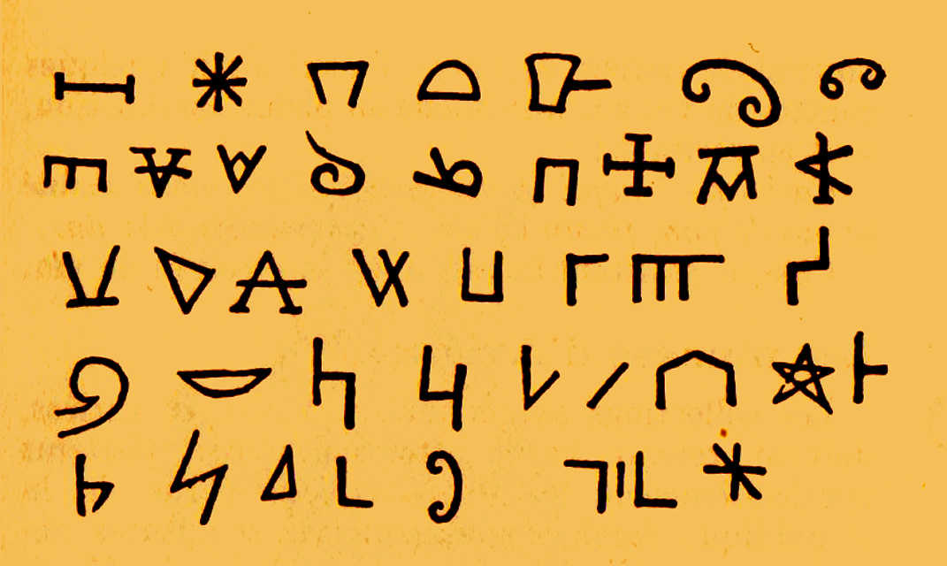 Marques de tâcherons relévées sur les remparts d'Avignon à la fin du XIXe s